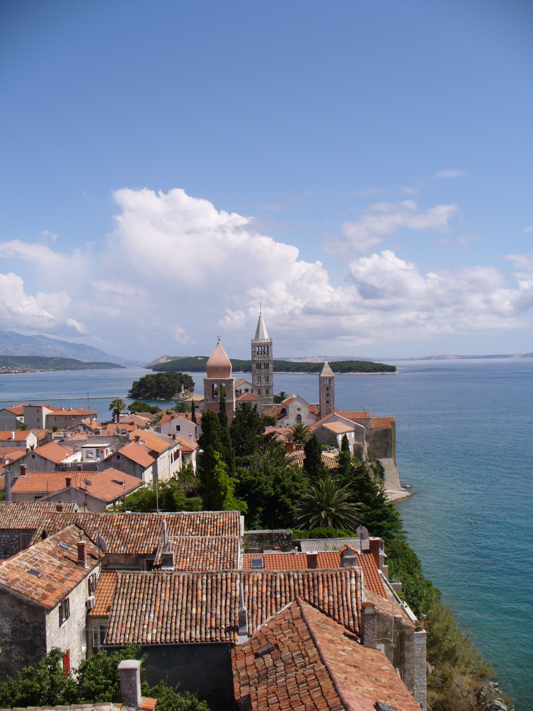 Rab Stadt